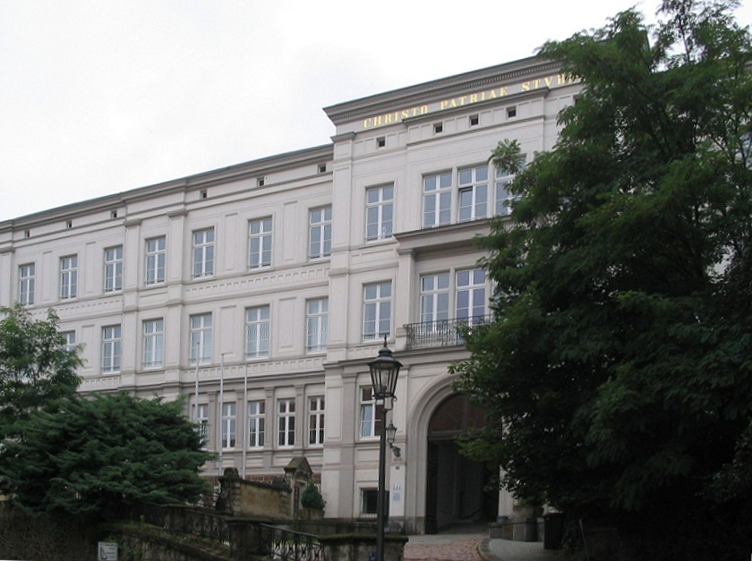 Sächsisches Landesgymnasium Sankt Afra in Meißen, Deutschland